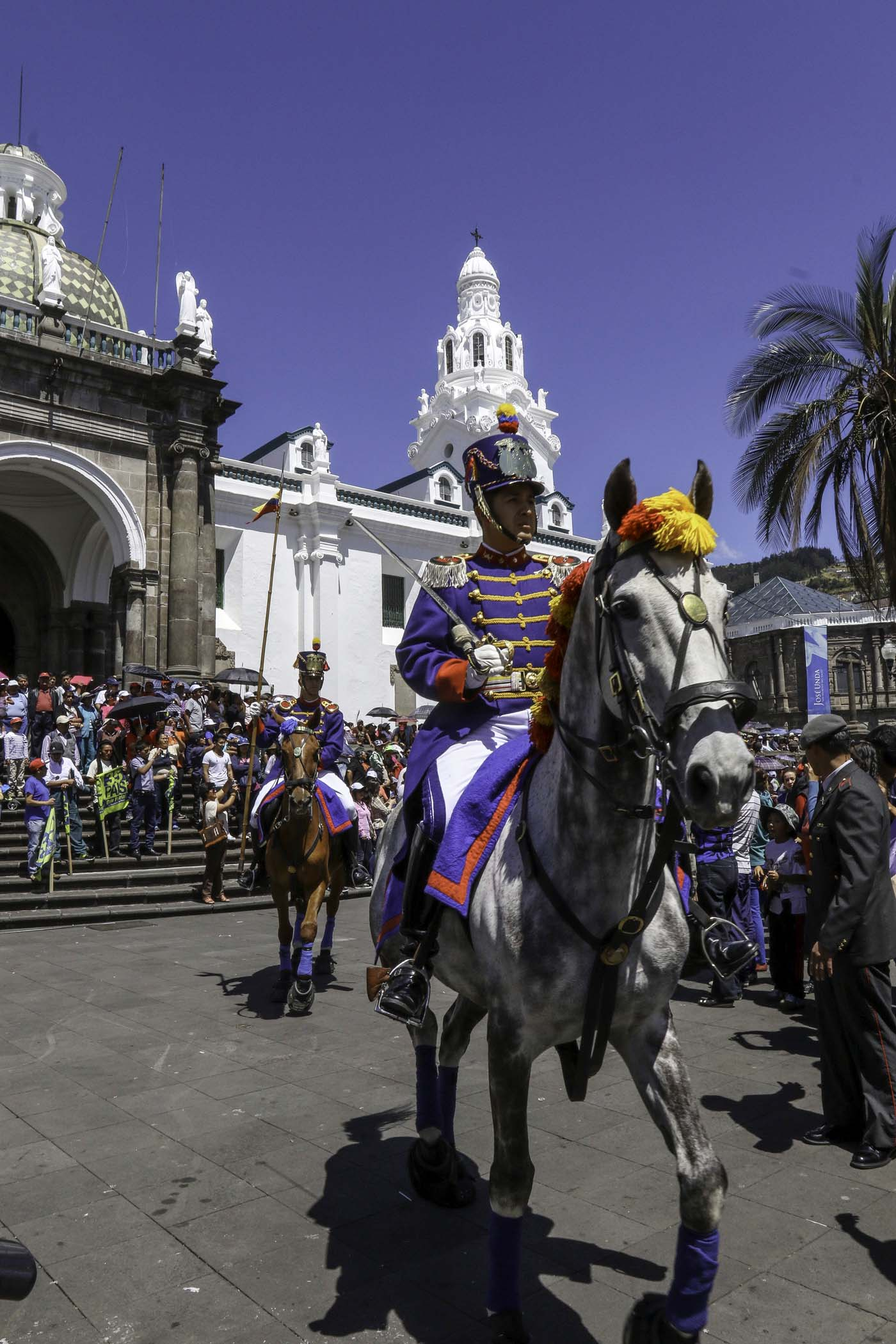 Quito, 10 ago (Andes).- Con la presencia del presidente de la República, Rafael Correa; el vicepresidente Jorge Glas, varios ministros de Estado e invitados se realizó este lunes el Cambio de Guardia dedicado a los héroes del primer Grito de Independencia, d el 10 de agosto de 1809. ANDES/Micaela Ayala V.